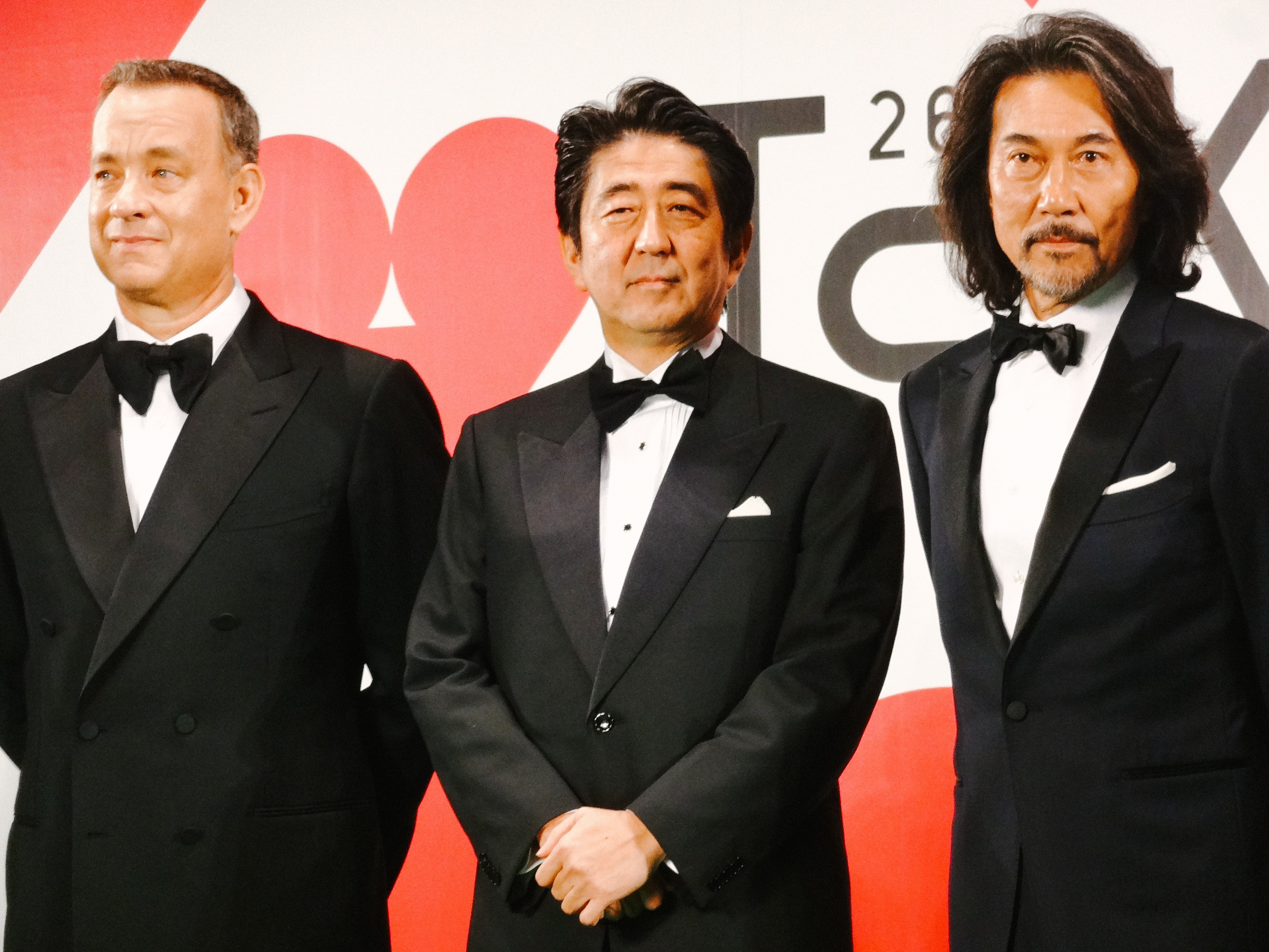 第26回 東京国際映画祭 トム・ハンクス (キャプテン・フィリップス) 役所広司 (清須会議) 安倍晋三 (内閣総理大臣)